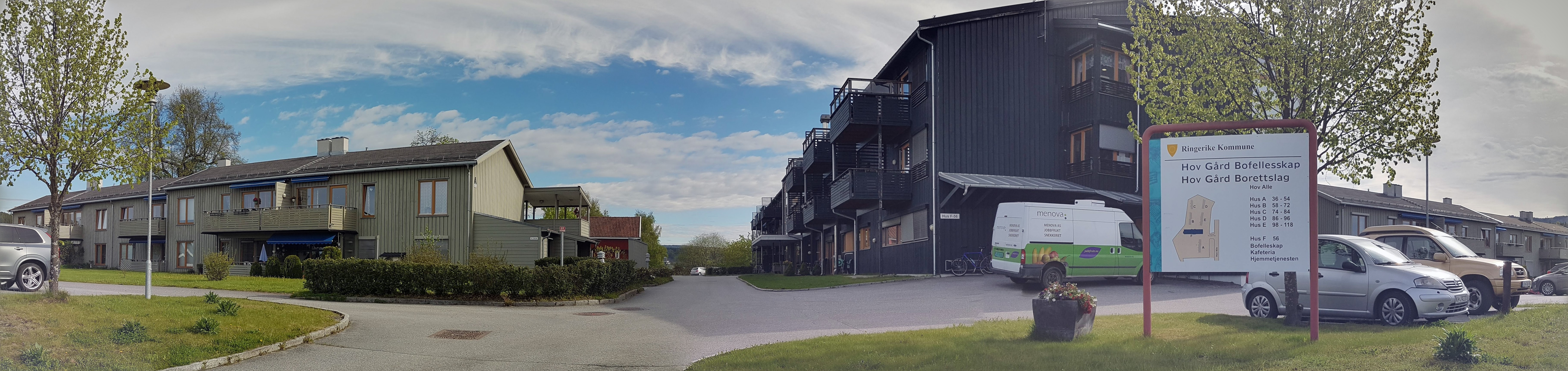 Panorama av Hovsenteret (Hov gård) på Hønefoss, som blant annet inkluderer Hov gård bofellesskap (for psykisk utviklingshemmede, den store hovedbygningen på bildet) og Hov gård borettslag (omsorgsleiligheter)